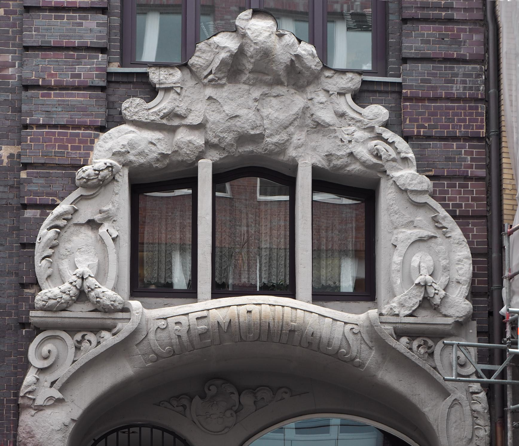 Hamburg-Altstadt, Cremonhaus Eingangsportal, Cremon 10 bis 11, Foto: 2016